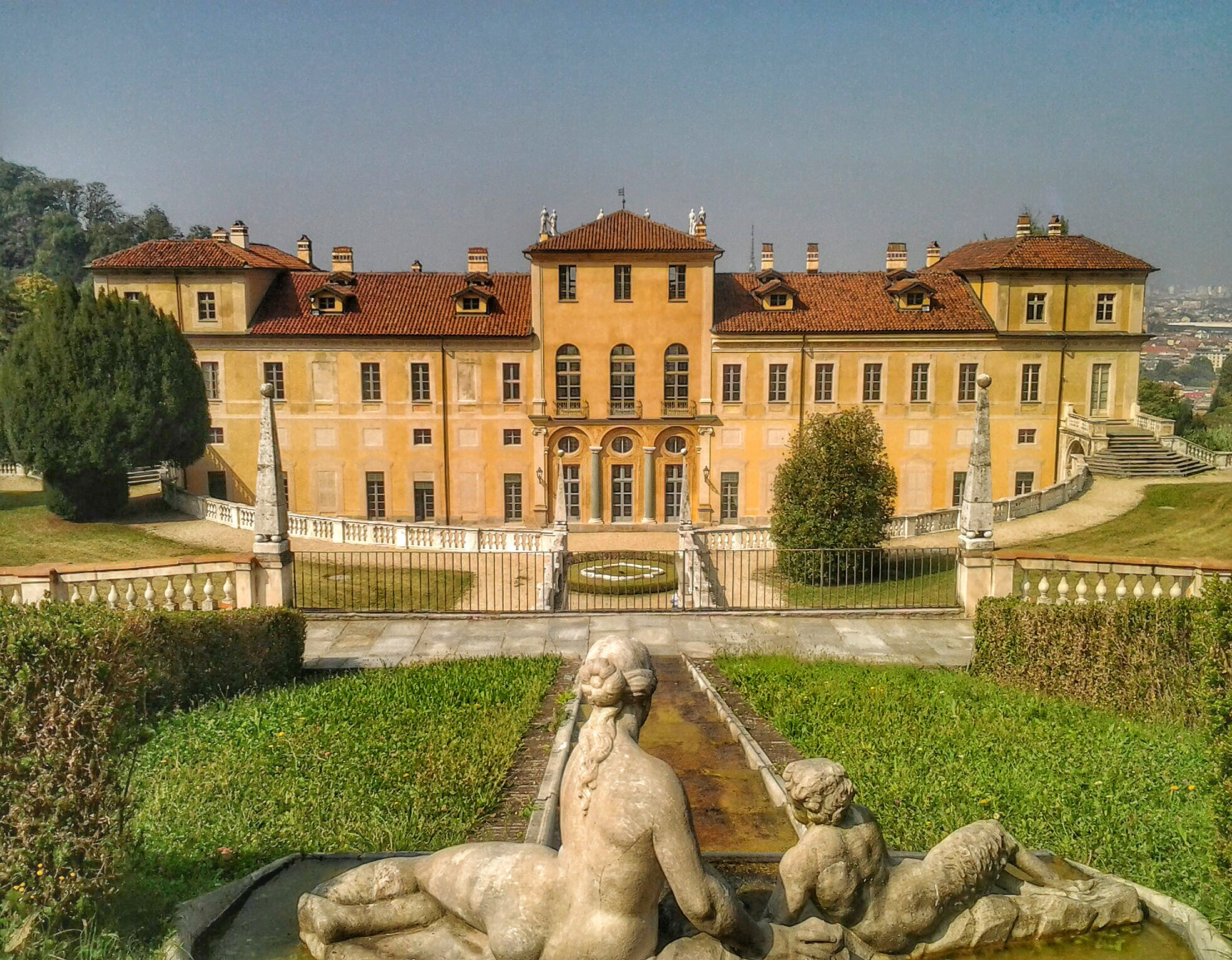 Retro Villa della Regina di Torino